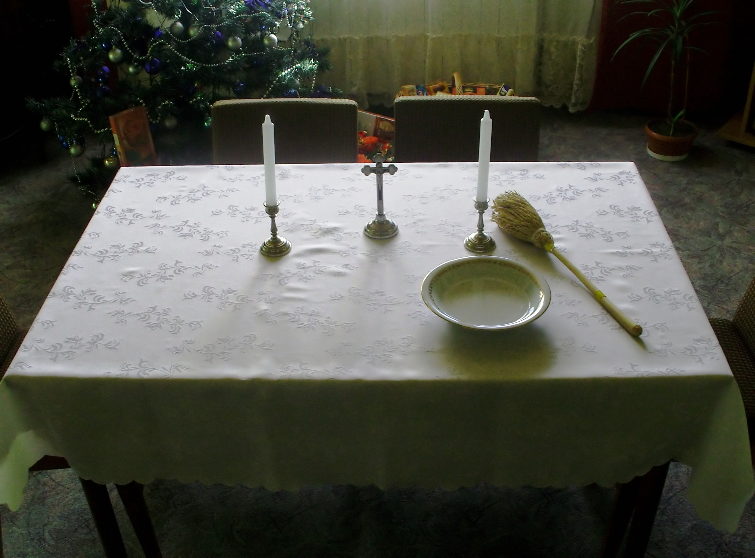 Stół przygotowany na wizytę duszpasterską (kolędę).